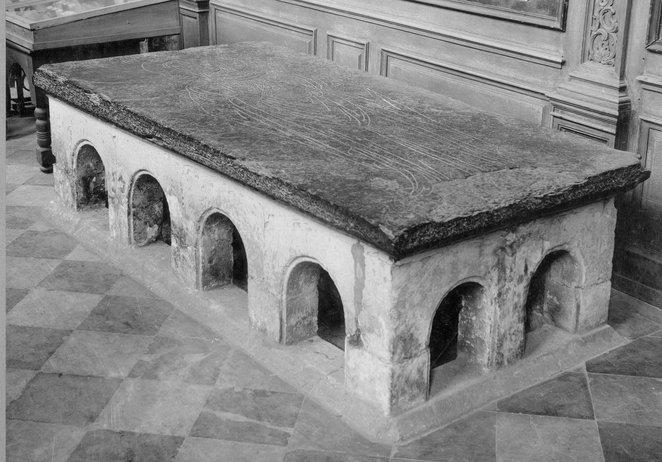 Forest (Belgique) - Église Saint-Denis - Cénotaphe de sainte Alène (vers 1200). Mémorial de plan trapézoïdal. L'édicule percé d'arcatures est construit en grès lédien blanchâtre. Il est recouvert d'une pesante dalle plate en calcaire tournaisien, poli et noirâtre, sur laquelle est gravée une figure féminine en habit monastique et une inscription + SCTA HELENA +. Référence : Jean-Claude Ghislain, « Forest-lez-Bruxelles : Le cénotaphe roman de sainte Alène en l'église Saint-Denis », Bulletin de la Commission royale des Monuments et des Sites, Commission royale des Monuments et des Sites, t. 9, 1980, p. 5-29.